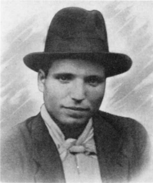 Foto di Comasco Comaschi